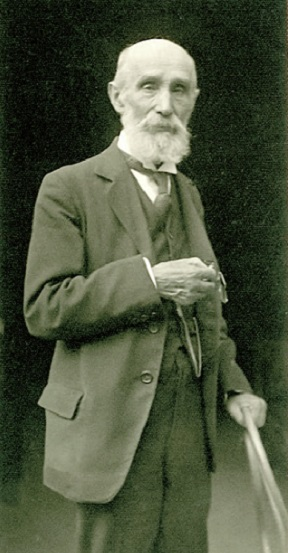 Pio Rajna